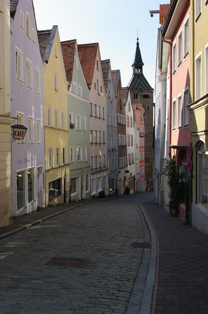 Alte Bergstra�e